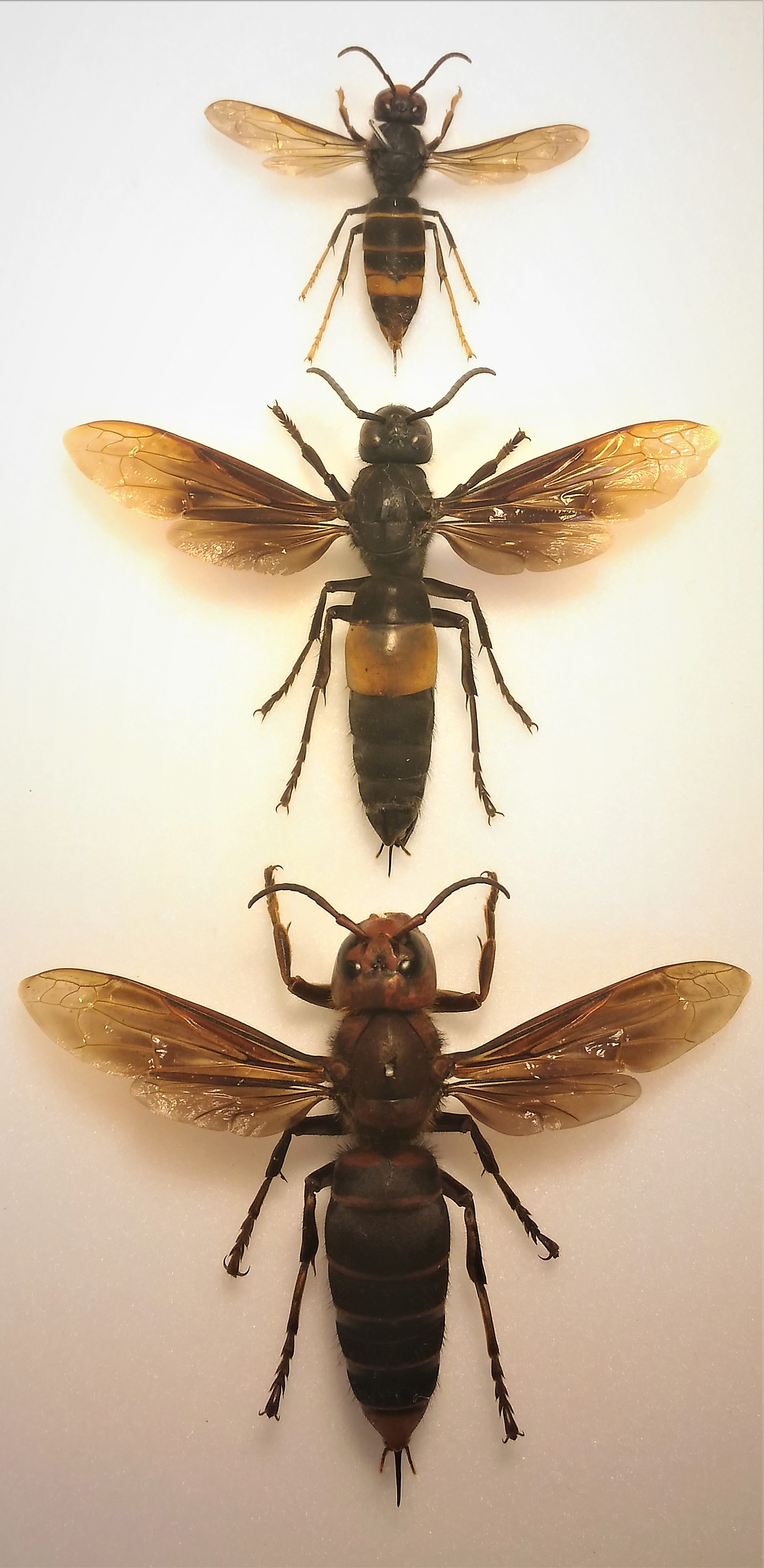 Vespa Velutina, Vespa Mandarinia Magnifica, Vespa Tropica, collezione privata, F. Turetta